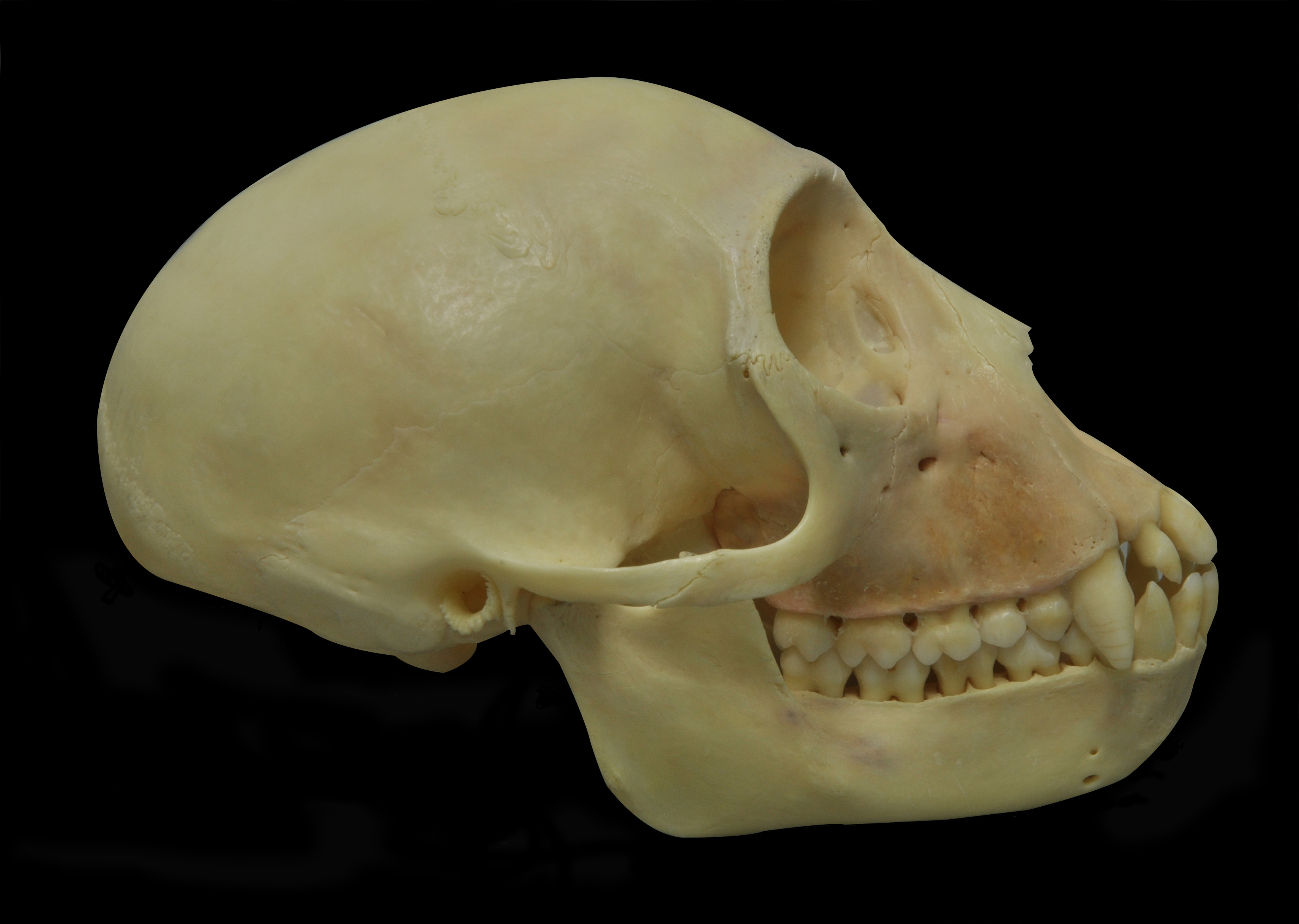 Visión lateral del cráneo de Cercopithecus mona